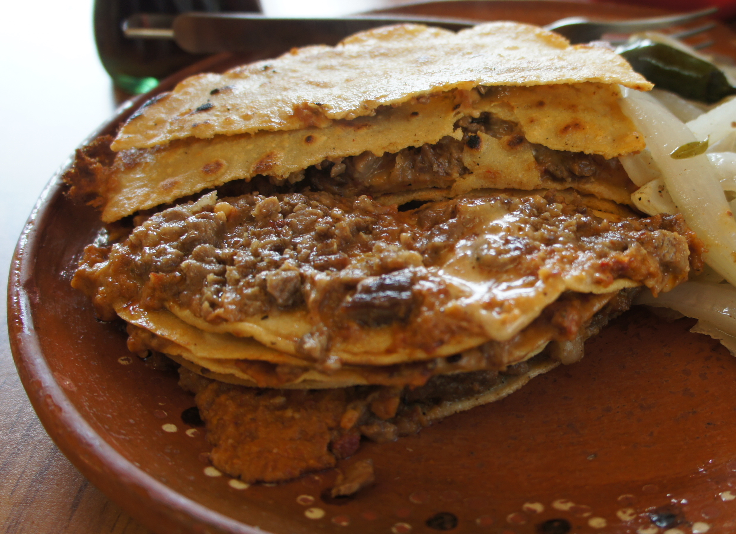 Empalmes de Agua Fría, N.L.